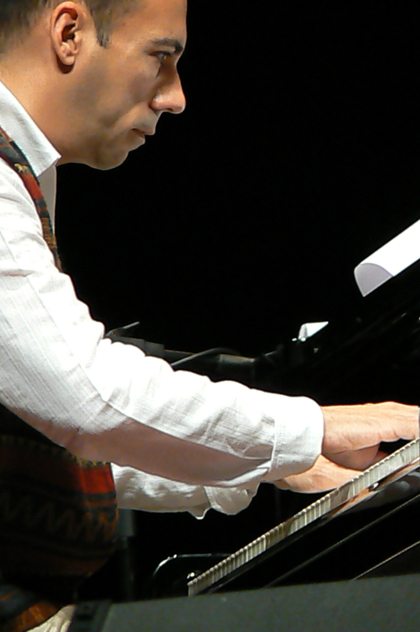 Juan Carlos Cambas - Pianista Argentino